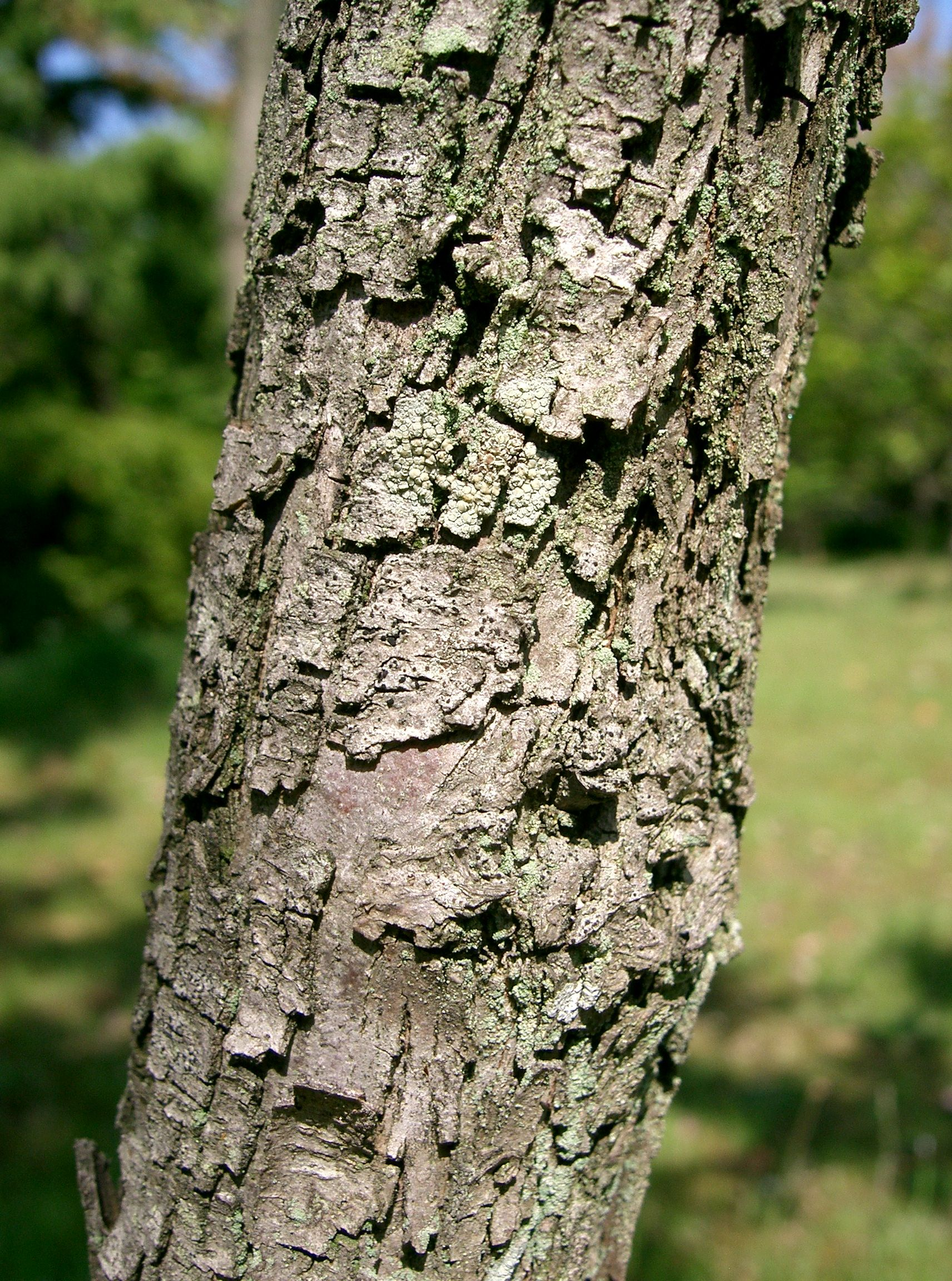 Ziziphus zizyphus